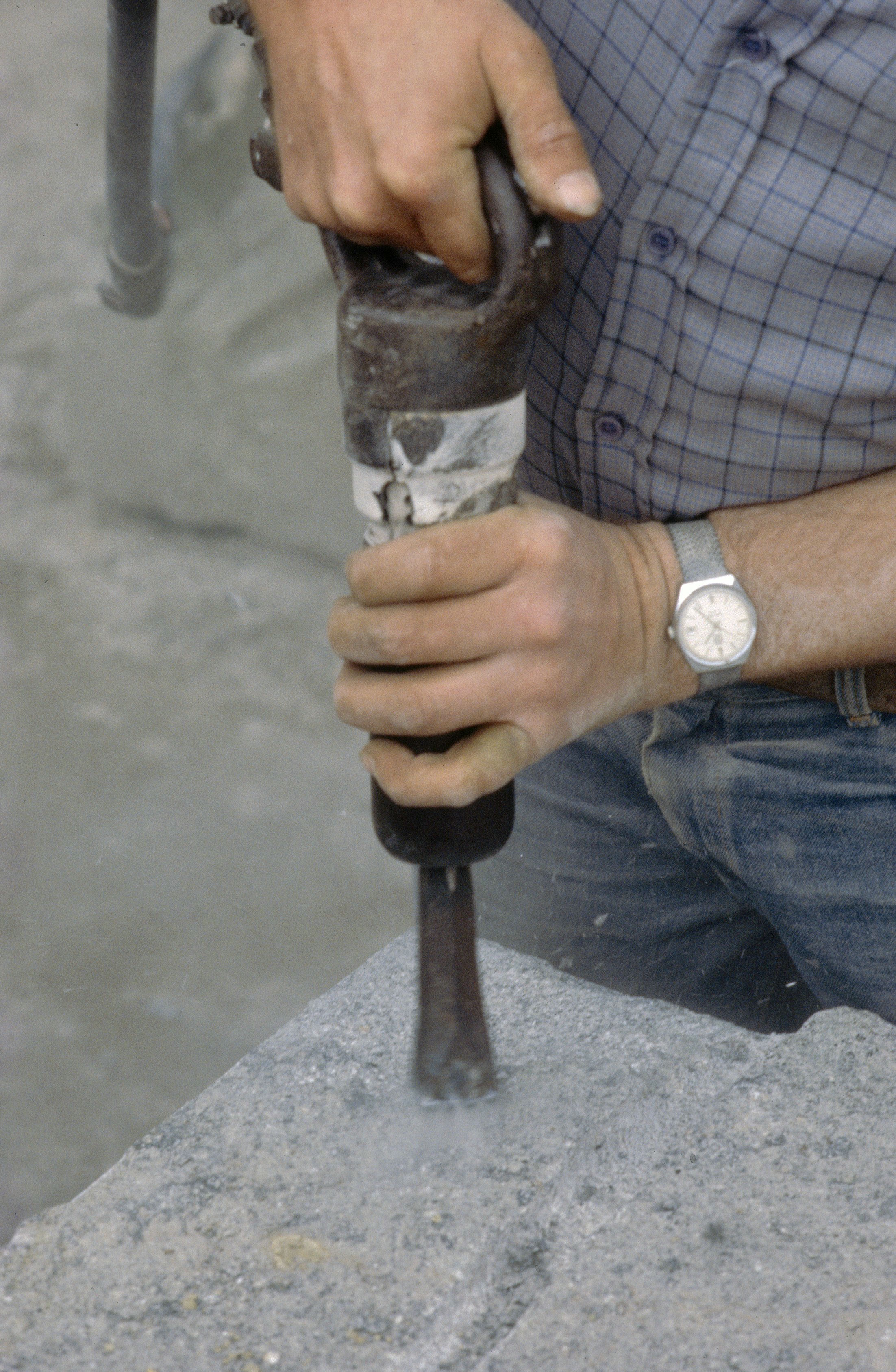 steenhouwerij: bouscharderen met lucht